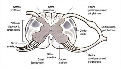 Le canal épendymaire est représenté au centre.